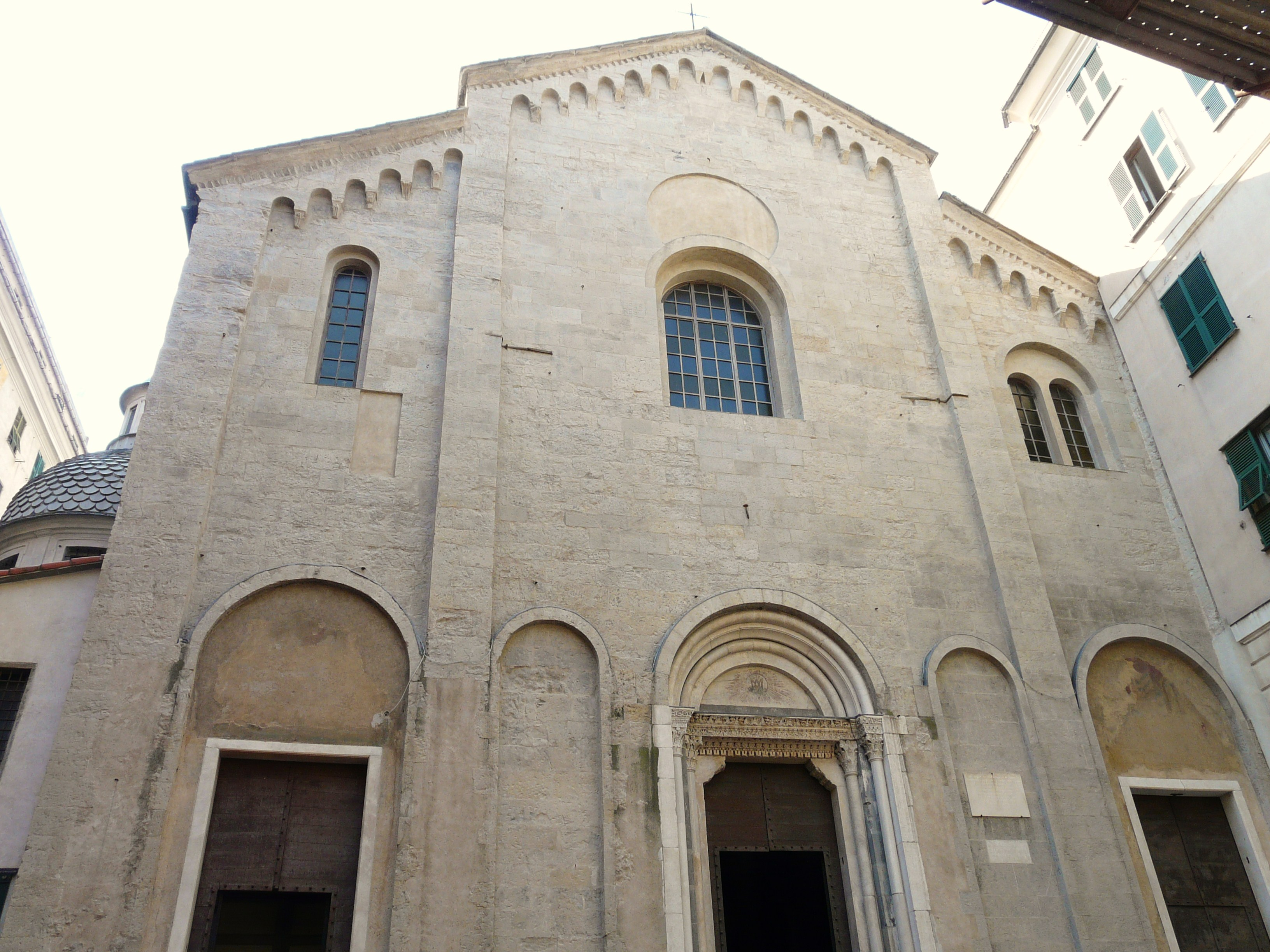 Chiesa di Santa Maria di Castello, Genova, Liguria, Italia